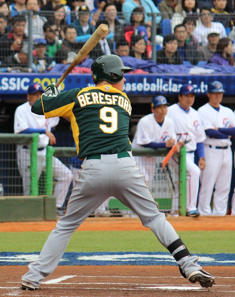 James Beresford